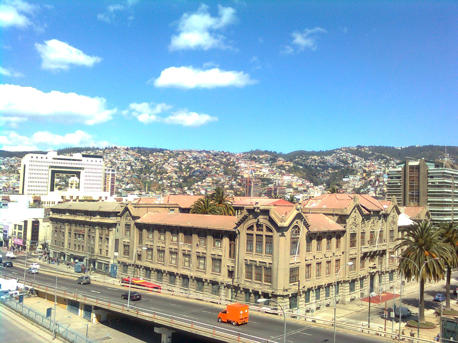 Casa Central de la Universidad Católica de Valparaíso This is a photo of a national monument in Chile: 575